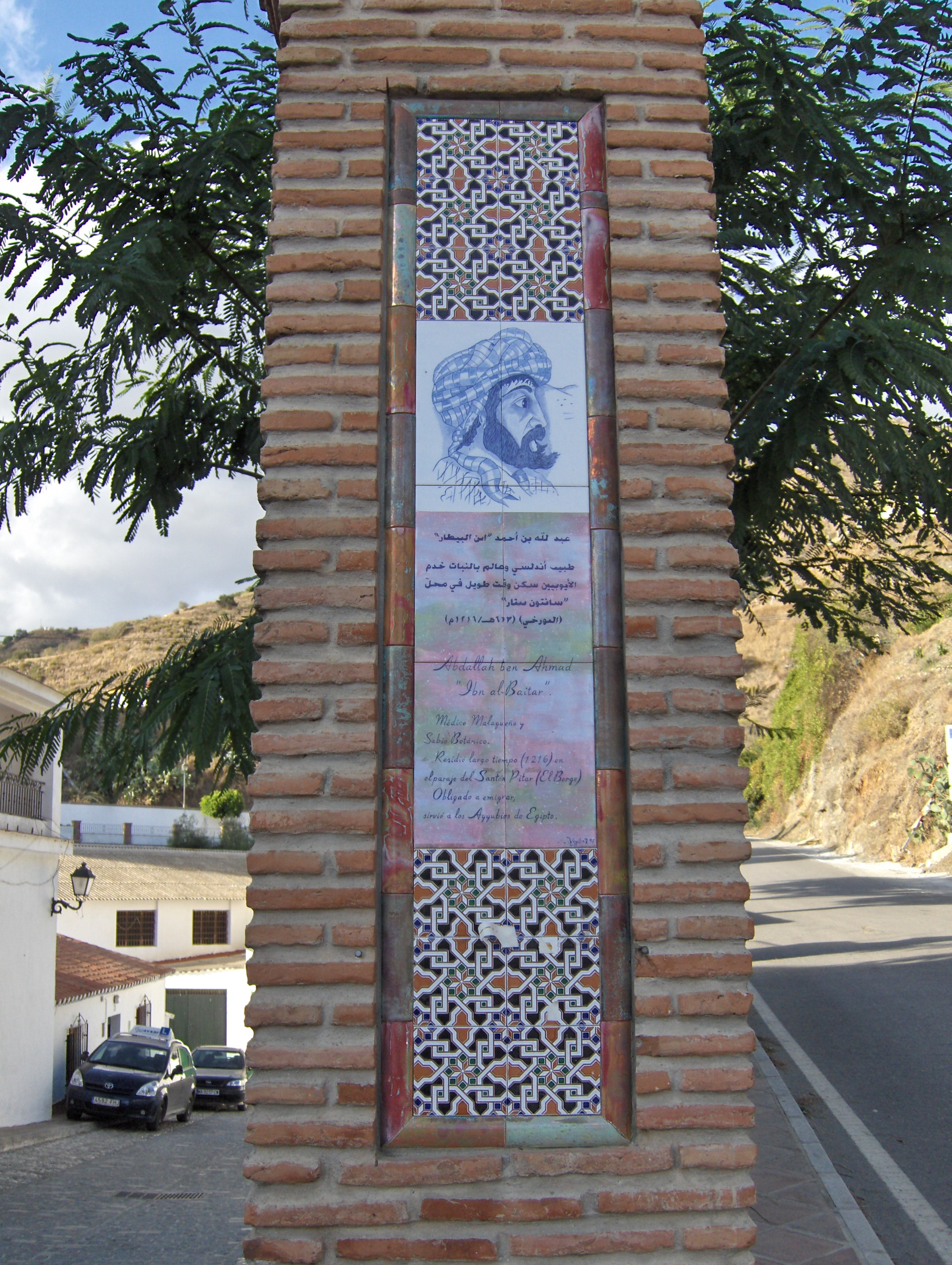 Recordatorio de Ibn al Baitar en el arco de entrada de El Borge, Málaga, Epaña.